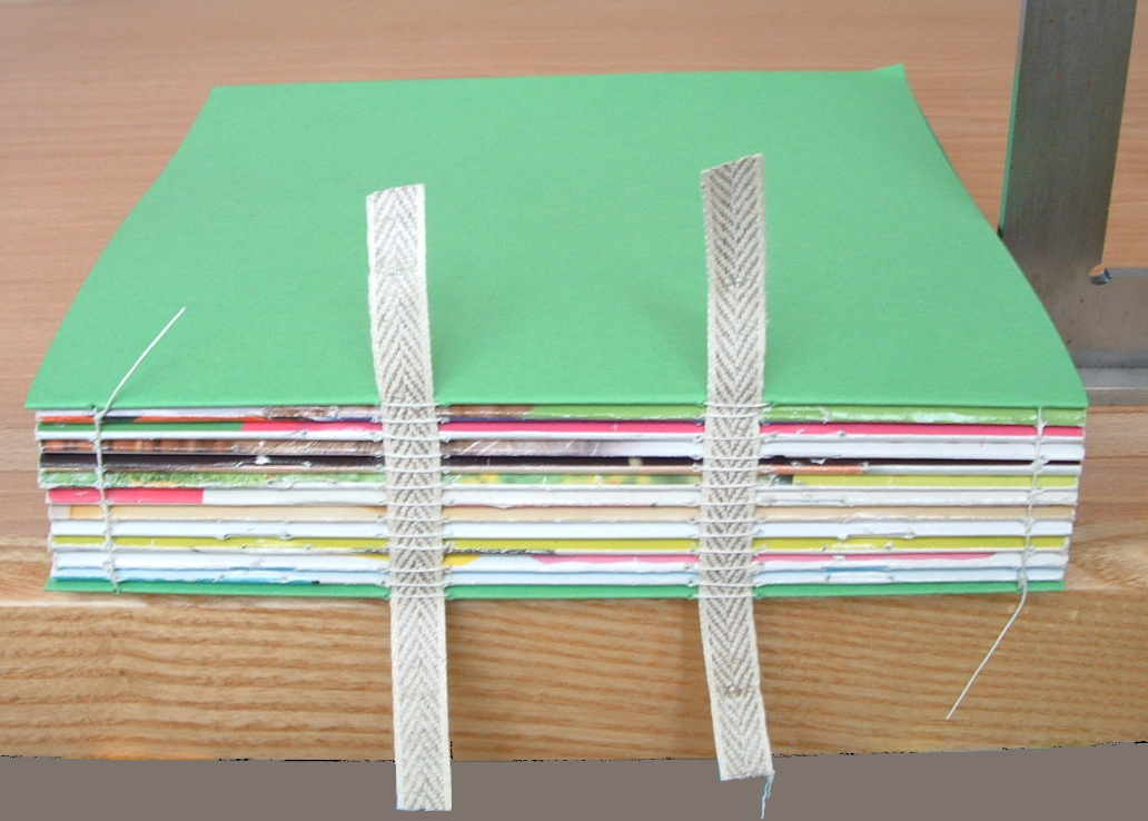 Ensemble des gardes et revues cousues sur ruban.